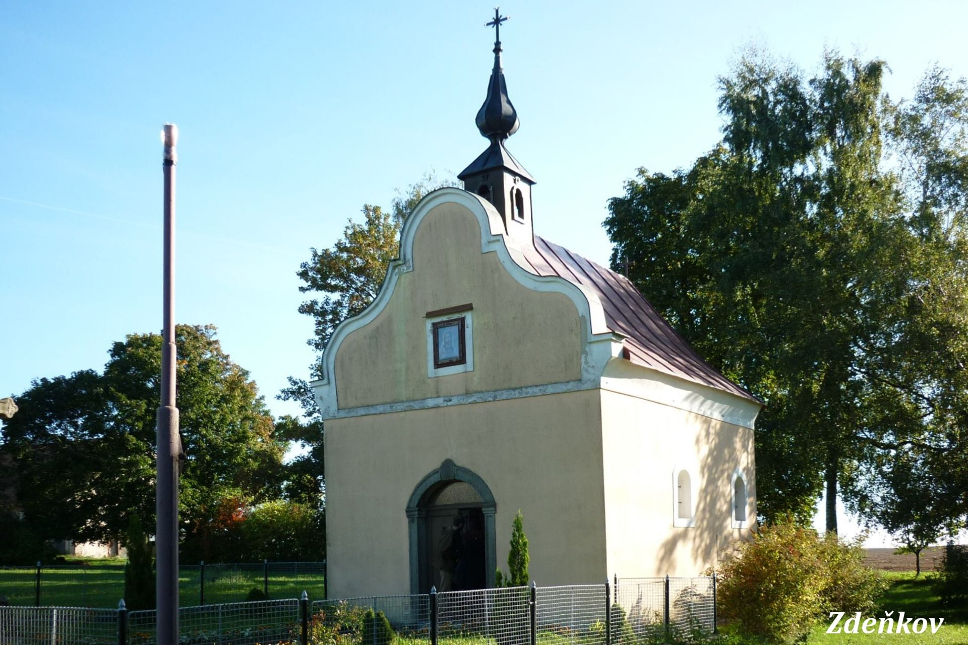 Kaplička ve Zdeňkově